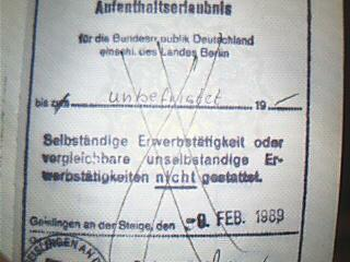 Unbefristete Aufenthaltserlaubnis in Stempelform in einem türkischen Reisepass von 1989 (nachtrag vom 9. 6. 1987) ausgestellt von der Ausländerbehörde in Geislingen an der Steige